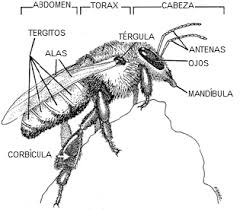 Morfologia de abeja melipona